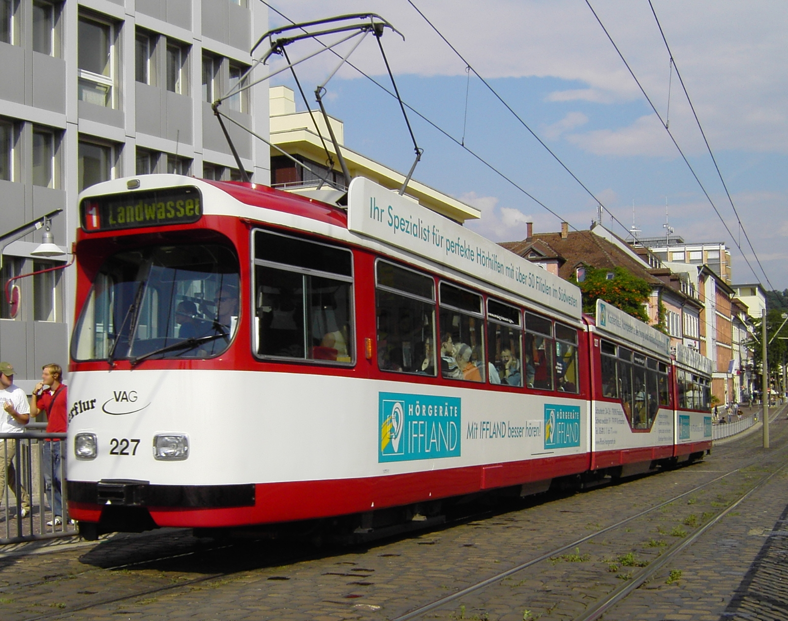 Straßenbahn Typ GT8 der VAG Freiburg